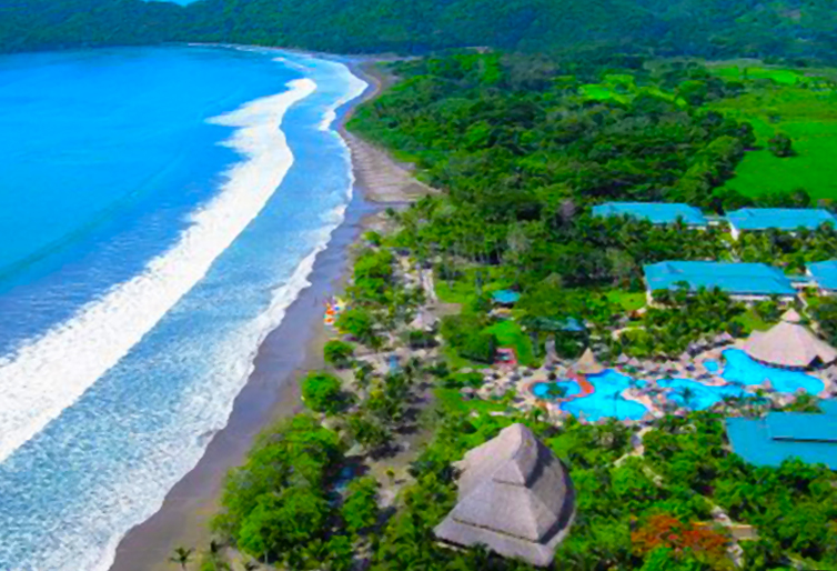 Hotel Barceló Tambor Beach en Bahía Ballena, Costa Rica.